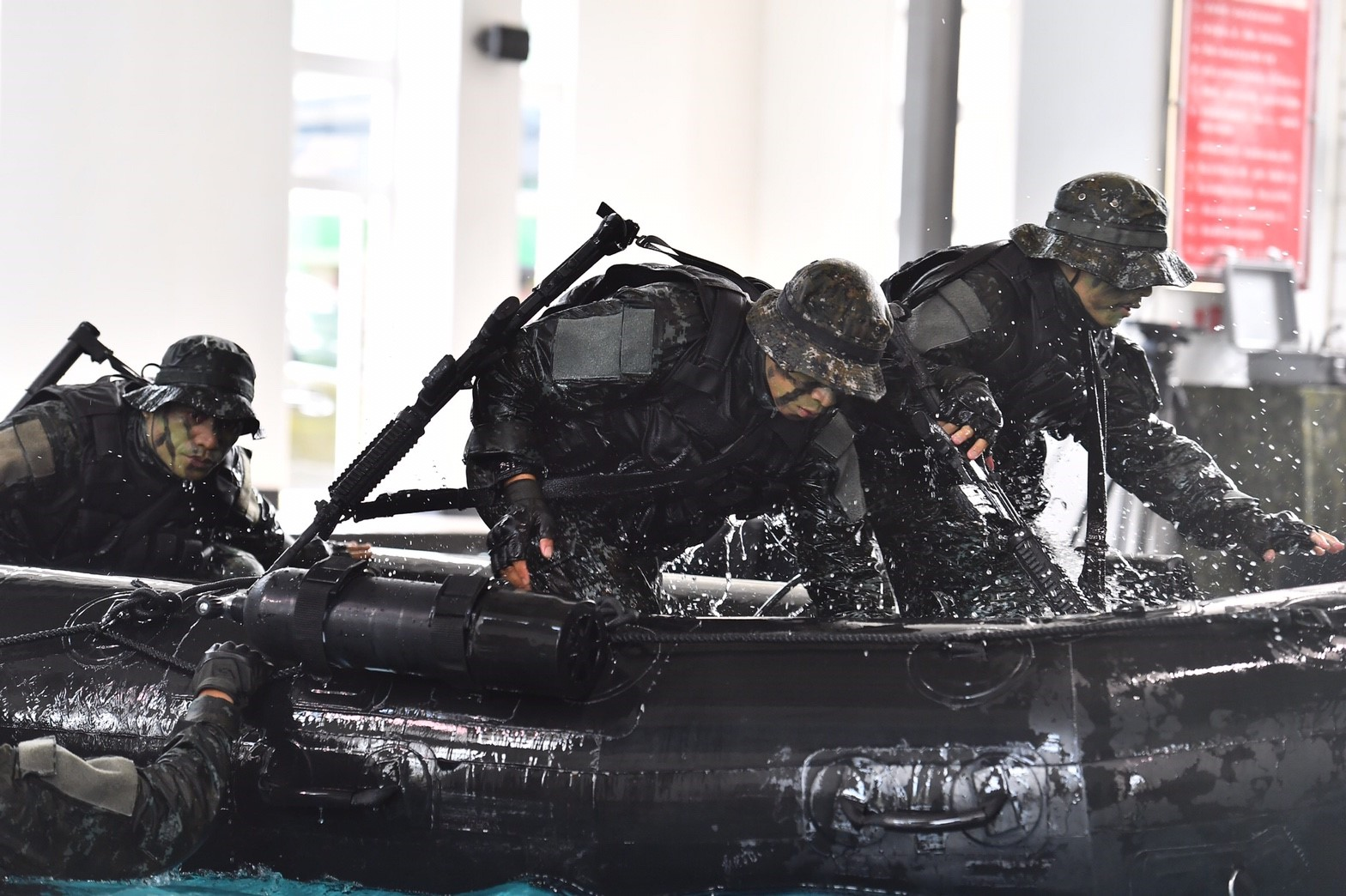 文言: 09.10 陸軍航特部兩棲營操演